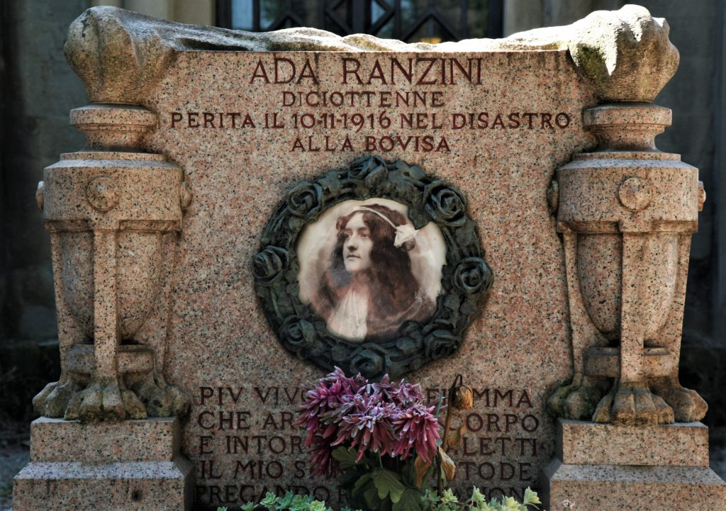 Tomba di Ada Ranzini, con ceramica, presso il Cimitero Monumentale di Milano, fotografia di Carla De Bernardi